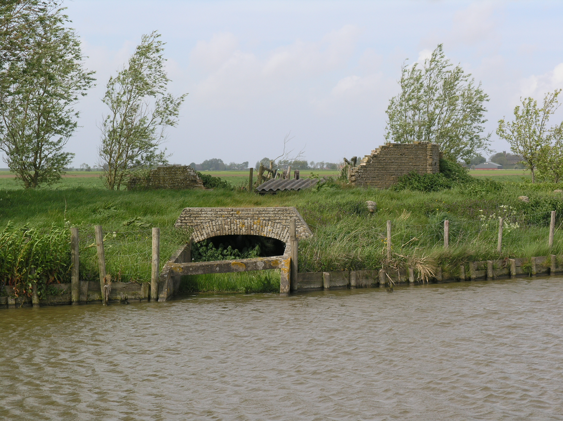 Ferwerd De Non molenrestant